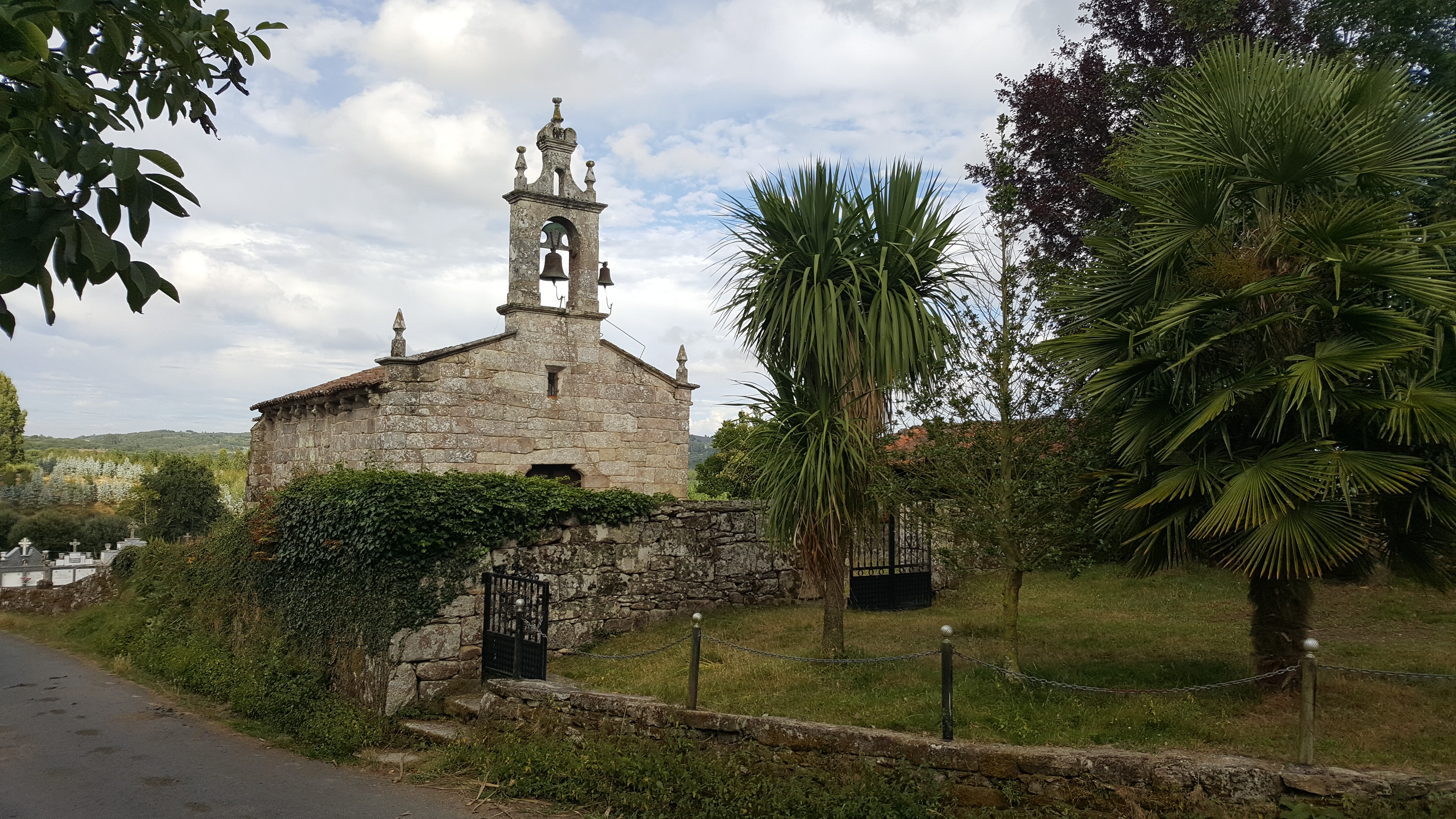 Igrexa de Marzá (Palas de Rei)